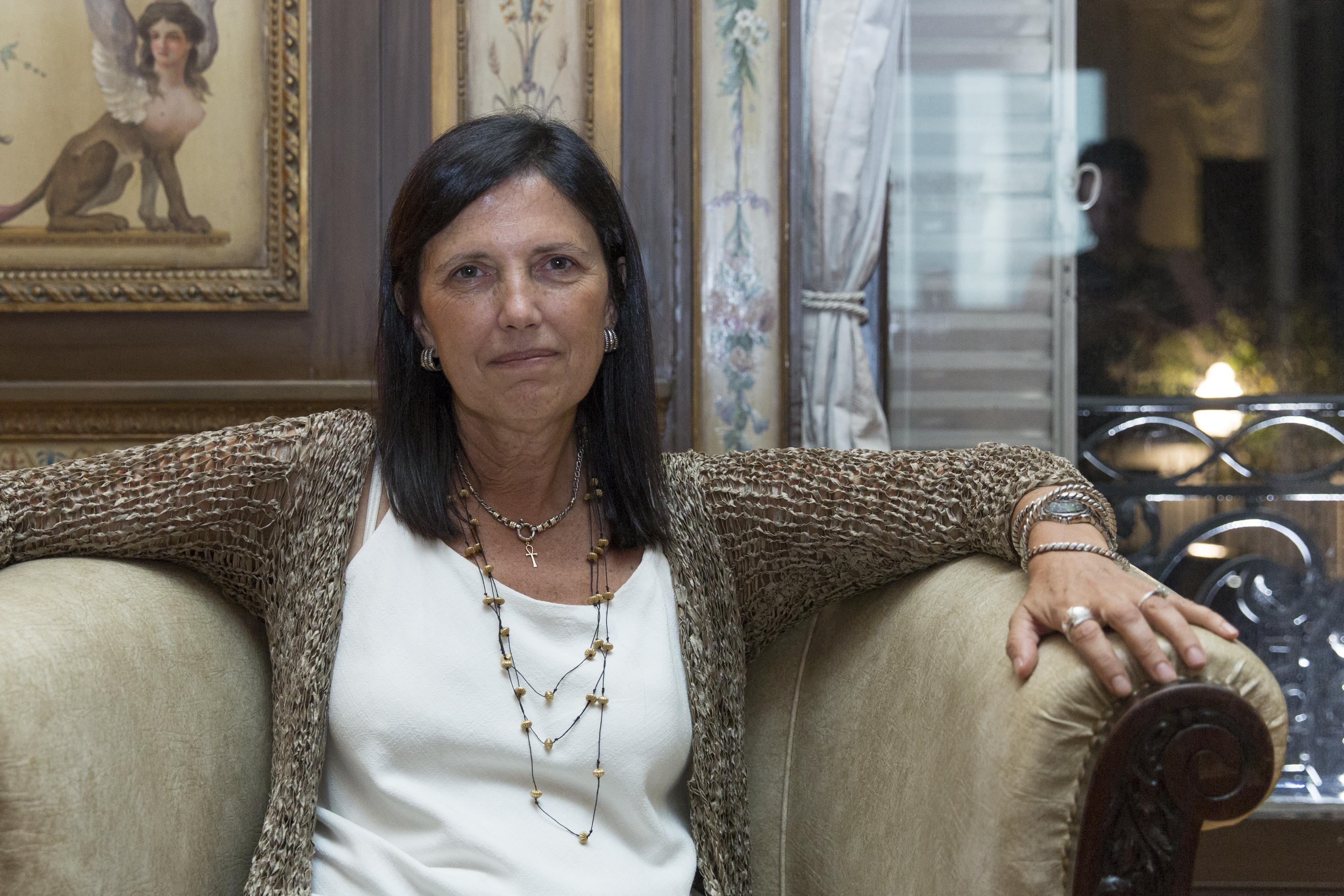 Buenos Aires, 10 de Abril de 2018.- Pablo Avelluto recibió a los escritores, editores y artistas que viajarán a FILBO, Feria Internacional del Libro de BogotáFoto: Soledad Amarilla / Ministerio de Cultura de la Nación